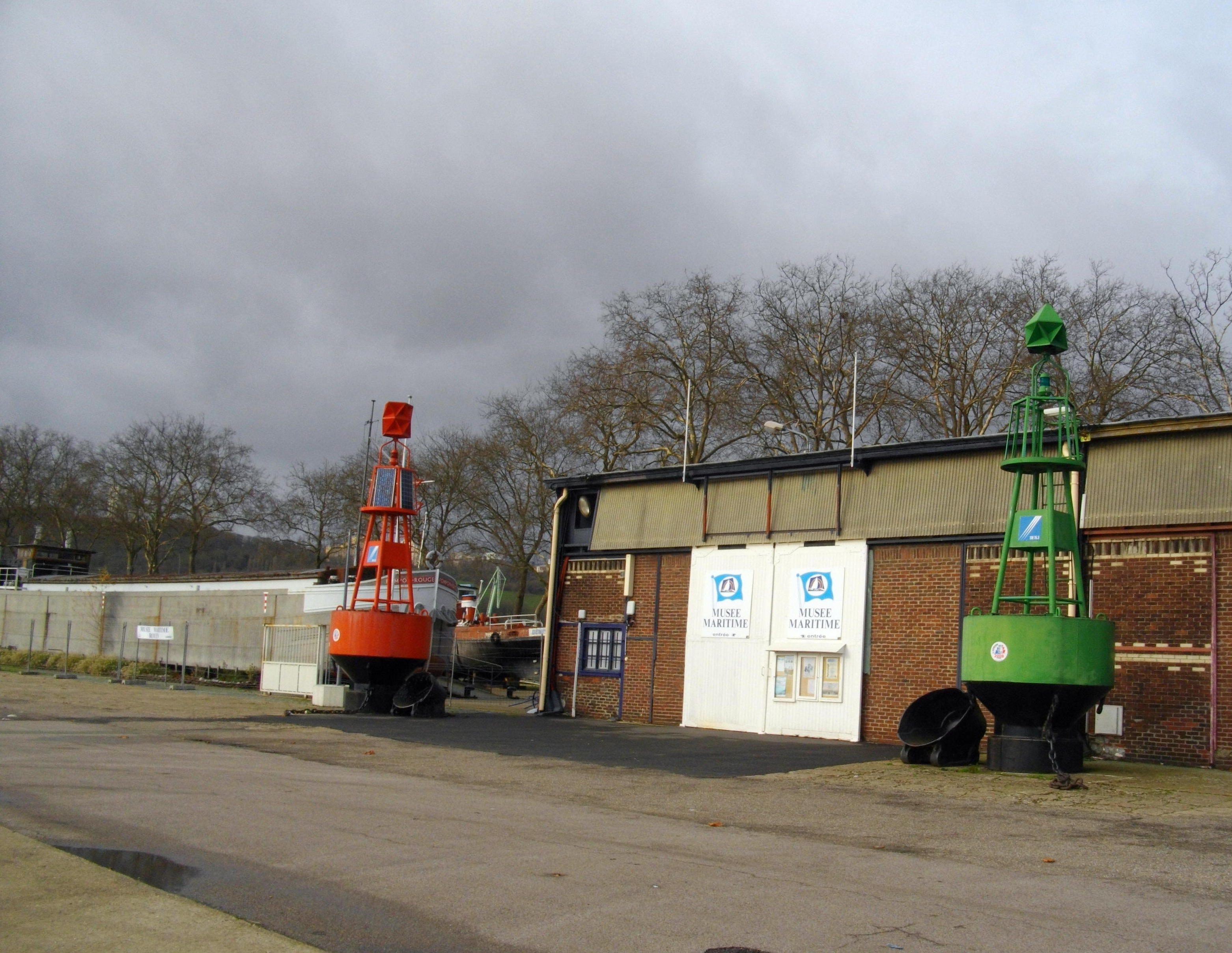 L'entrée du Musée maritime de Rouen